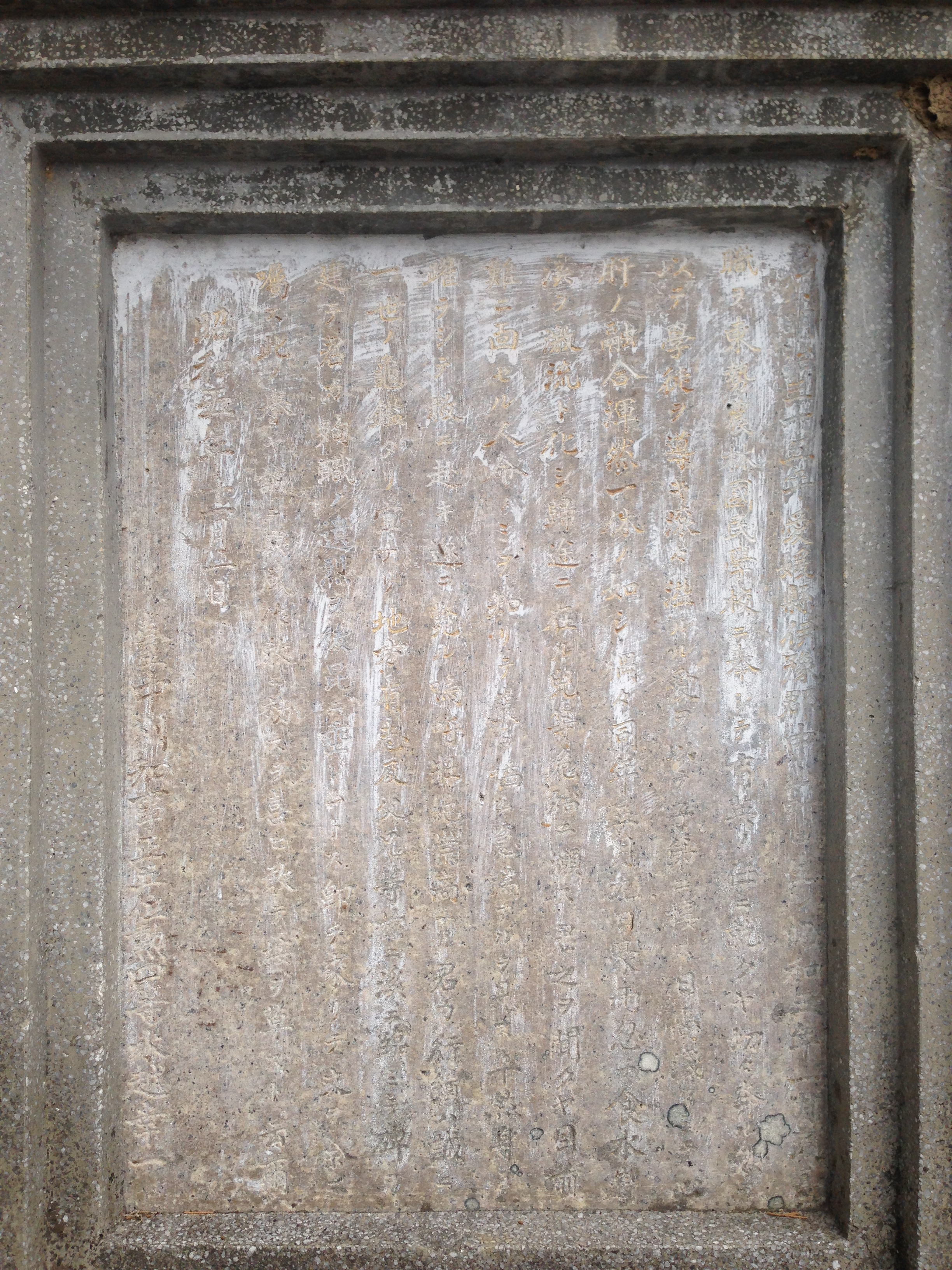 中文（台灣）: 殉職山岡先生之碑文